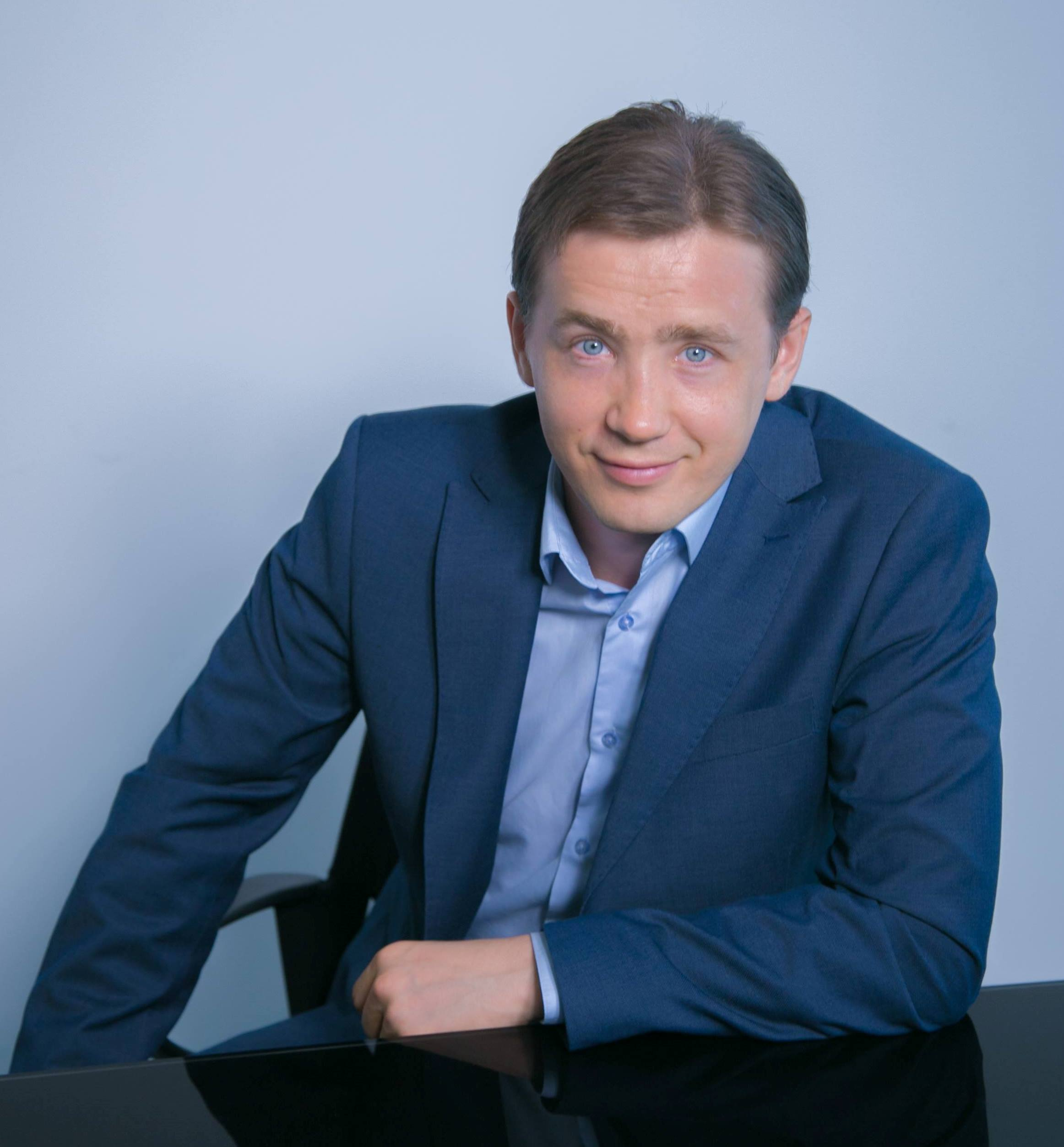 Журналист Василец Д.А.